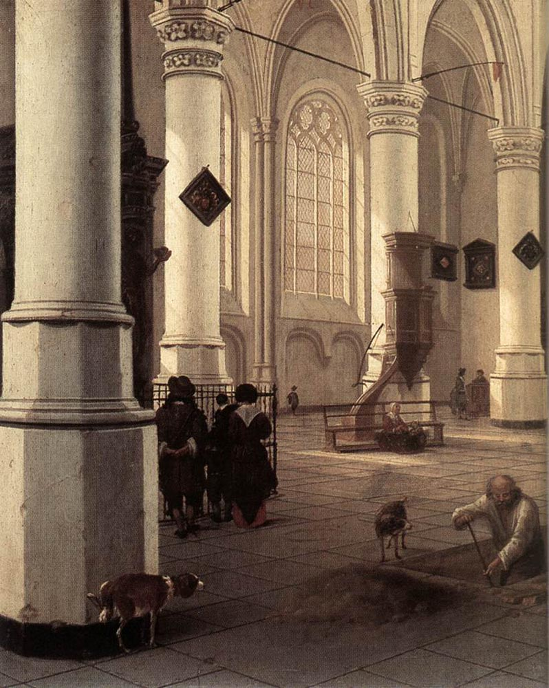 The New Church At Delftlabel QS:Lpl,"Nowy Kościół w Delft"